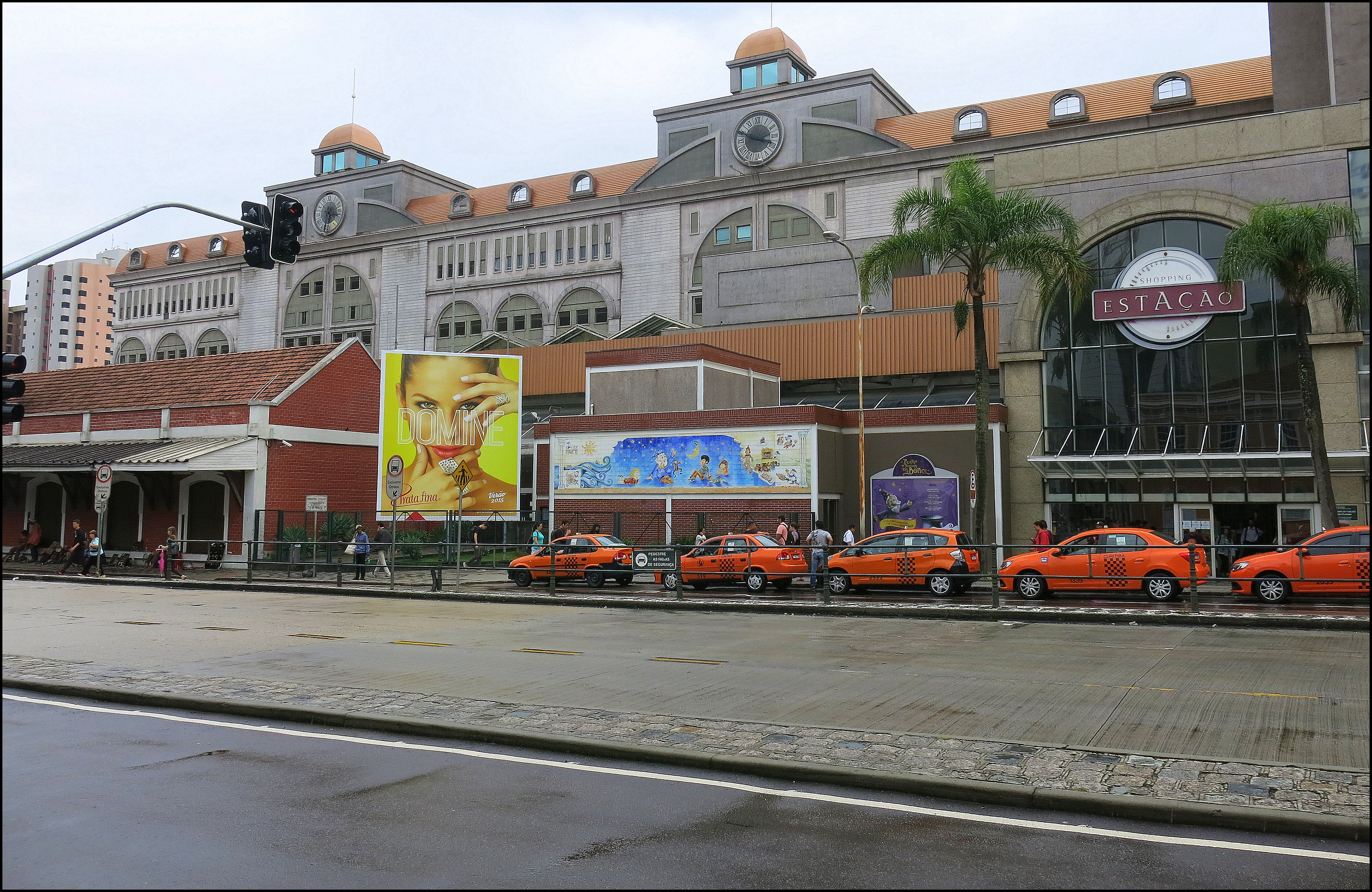 Shopping Estação